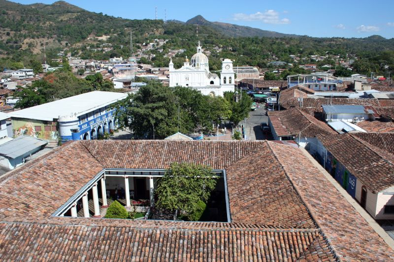 Chalatenango, El Salvador